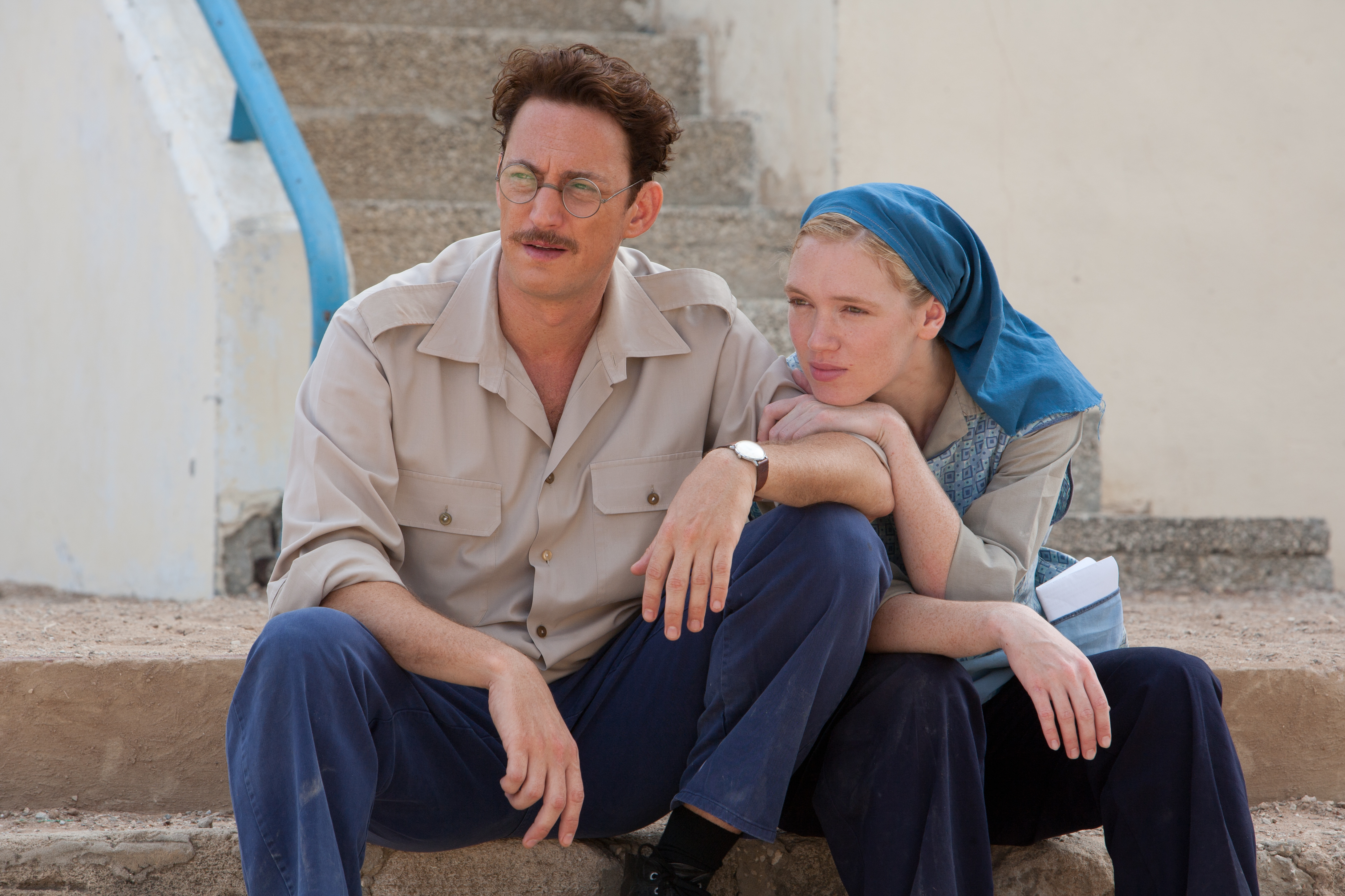 אלונה איב ויחזקאל לזרוב בסרטה של דינה צבי ריקליס ברקיע החמישי